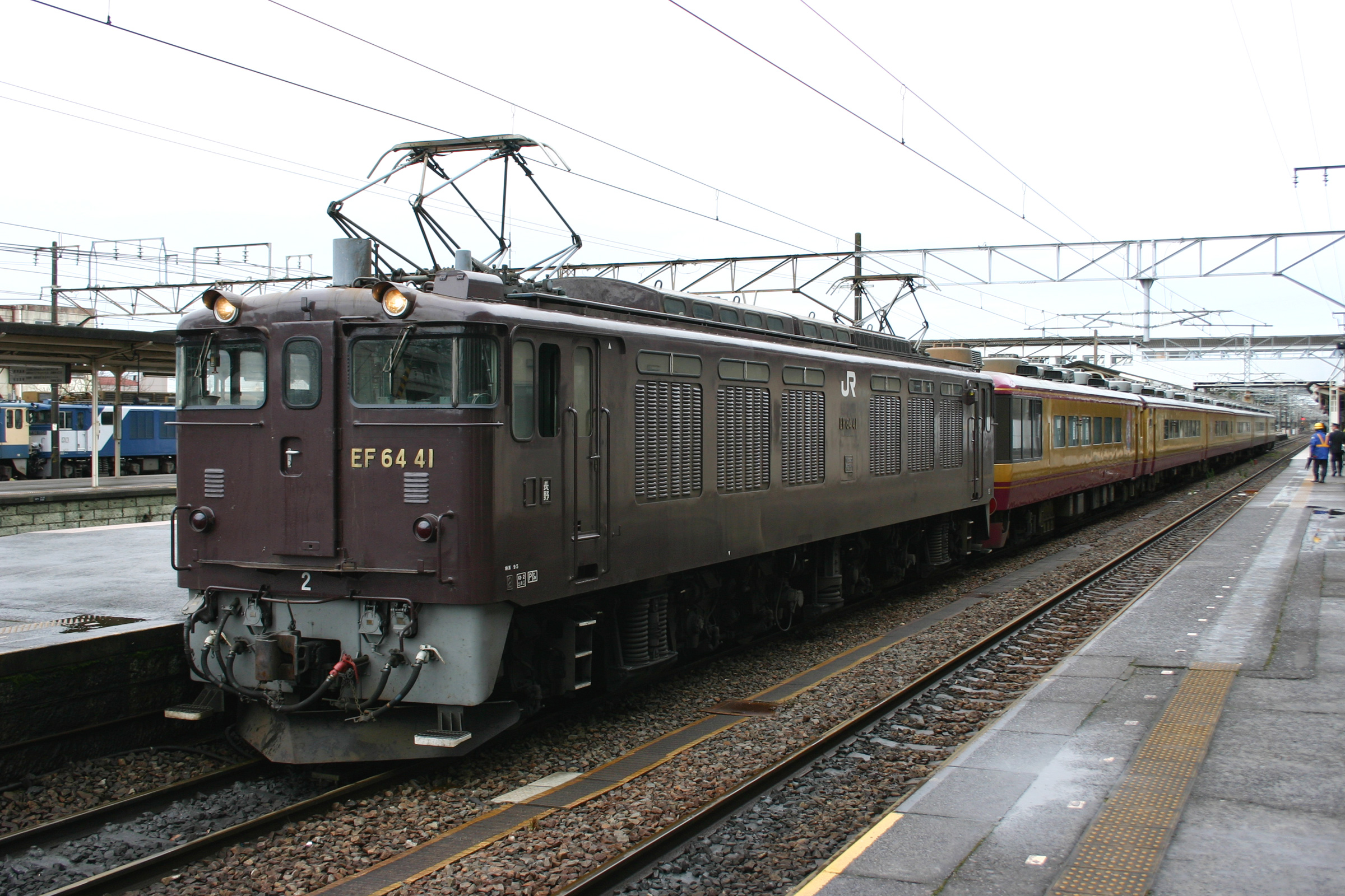 浪漫を牽引するEF64-41